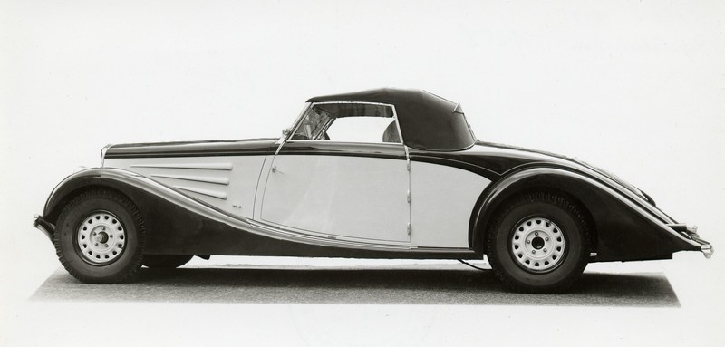 Lancia Belna Cabriolet 1935 carrossé par Pourtout